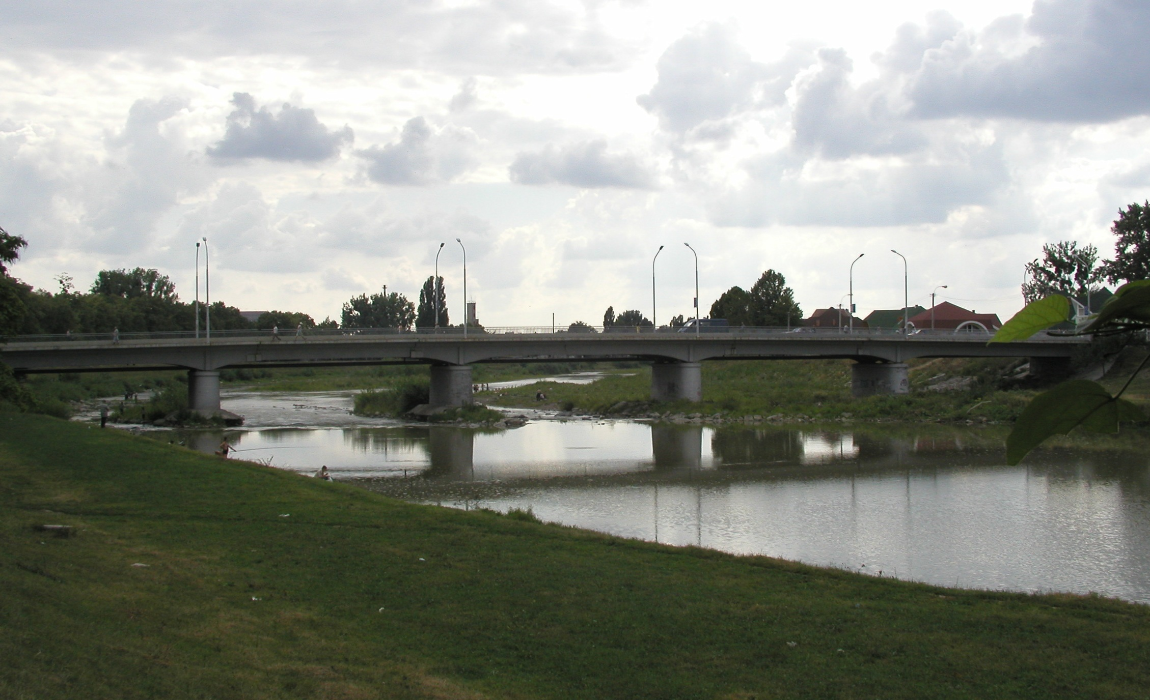 Latorica